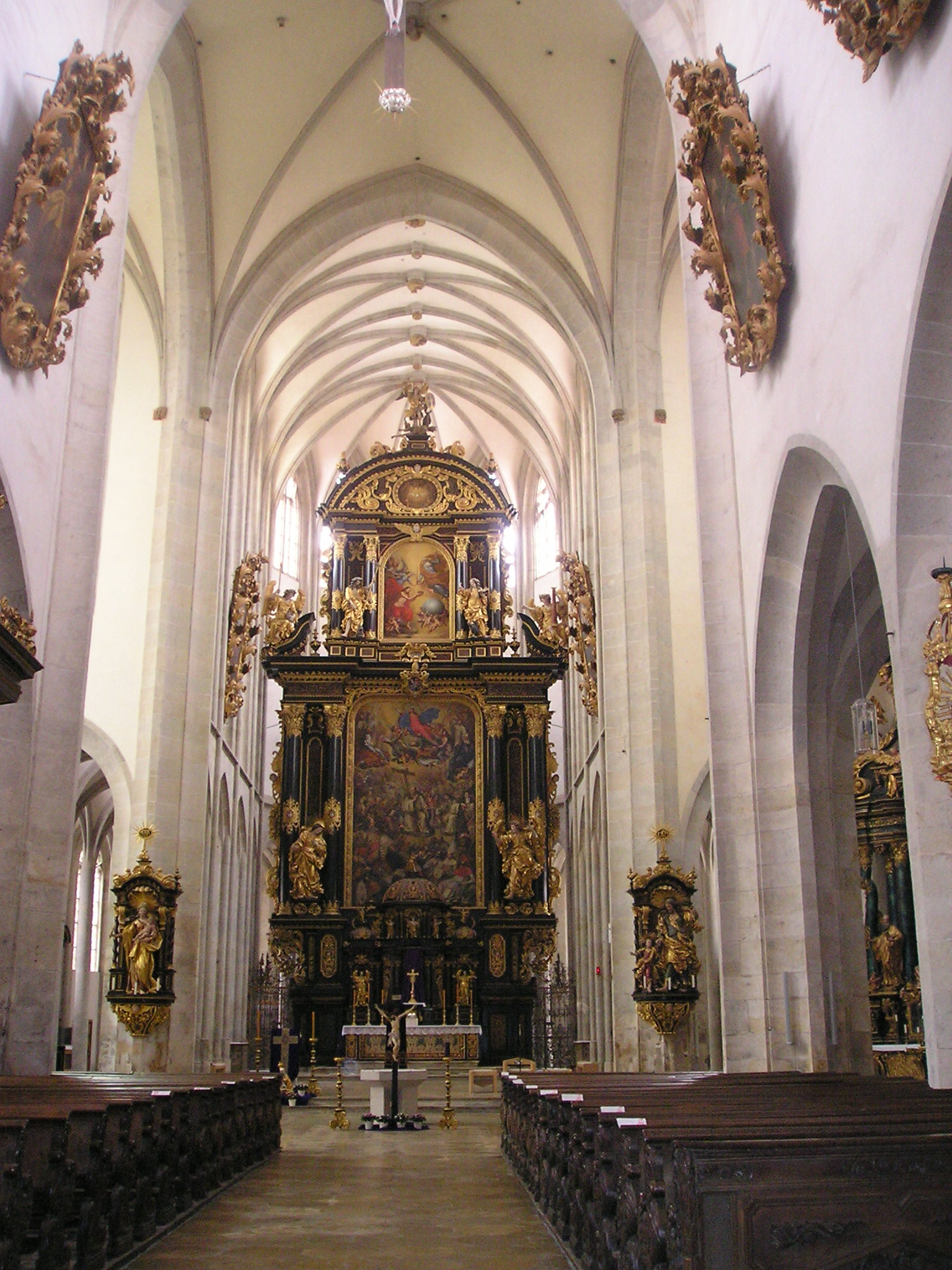 Kaisheim Klosterkirche, innen